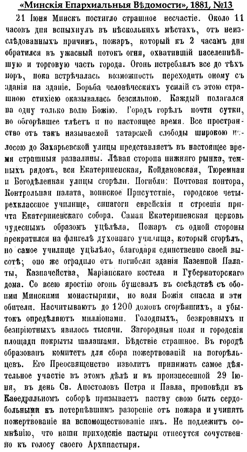 Мінскія епархіяльныя ведамасці. Паведамленне аб пажары 21 чэрвеня 1881 года.